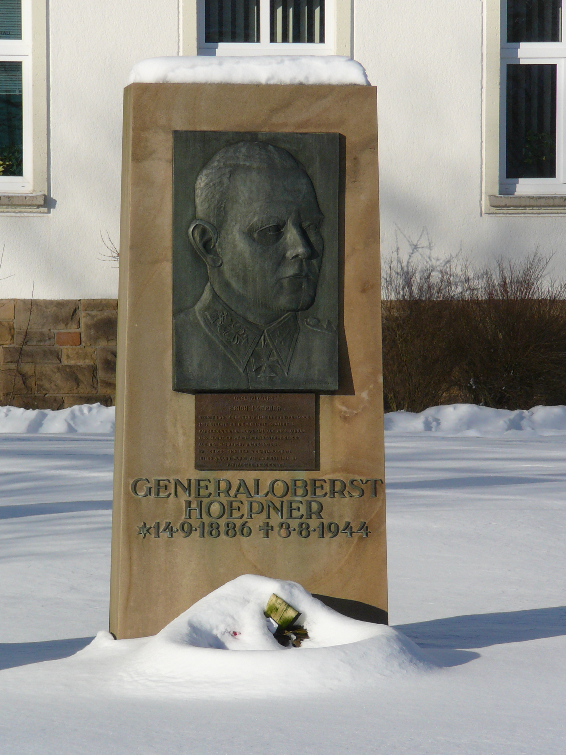 Lise-Meitner-Straße, Wuppertal